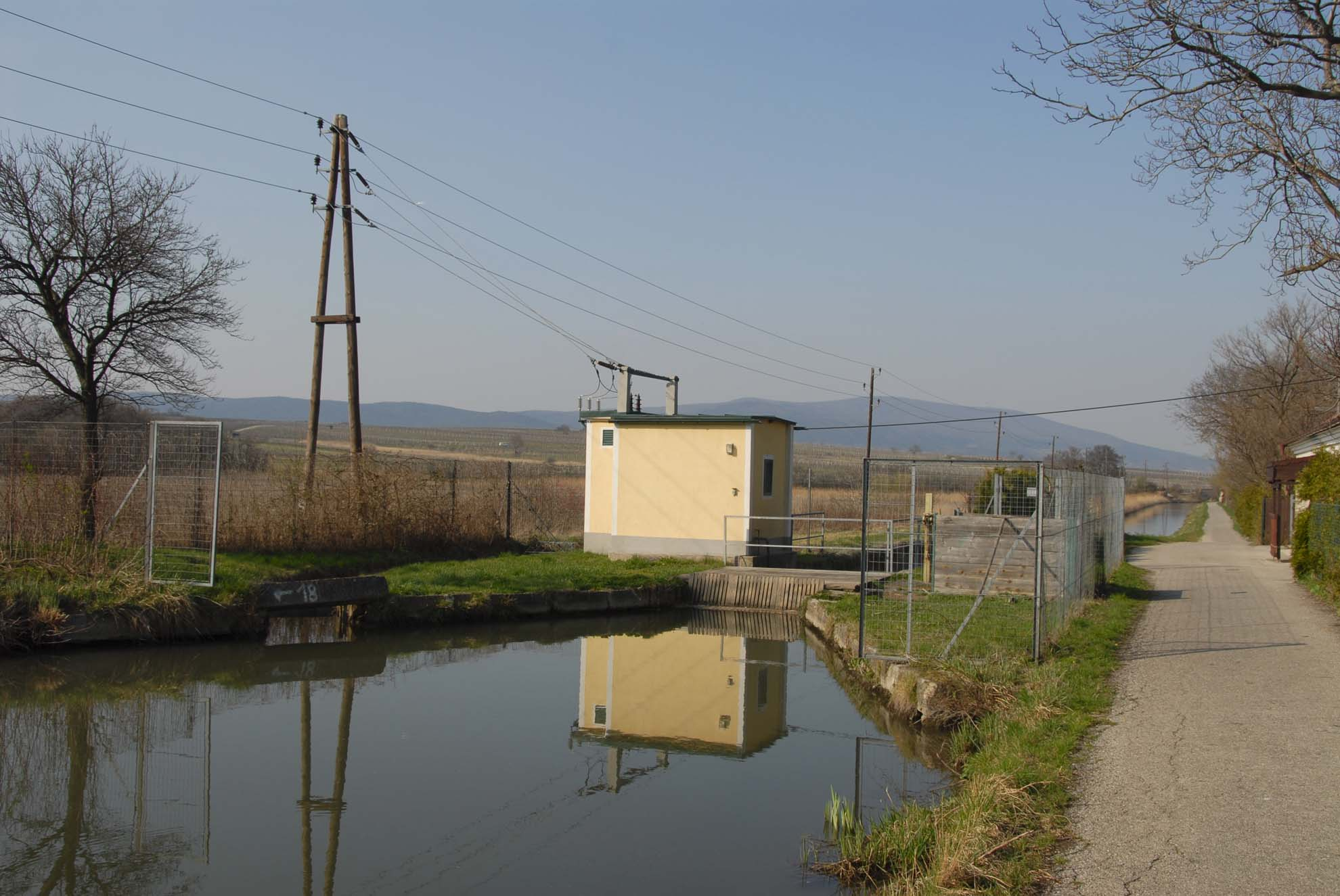 Kleinkraftwerk an der Schleuse 16 am Wienere Neustädter Kanal südlich von Baden, Rechts ein renoviertes Kanalwärterhaus.